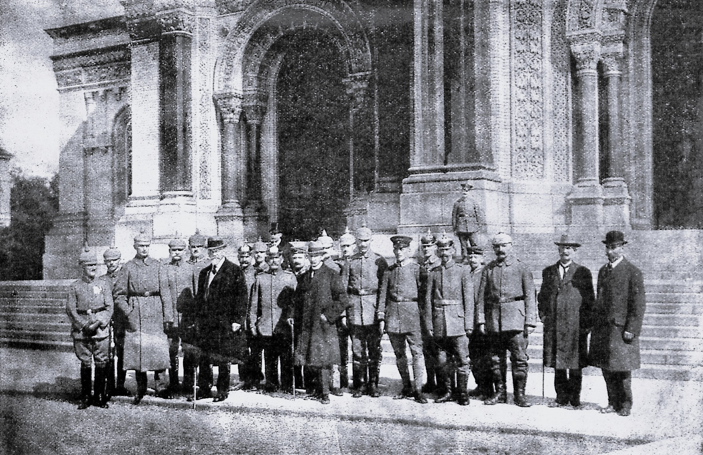 Bürgermeisters Dr. Fehling und Regierungsrat Dr. Plessing mit Lübecker Landeskindern vor der russischen Kathedrale in Warschau.